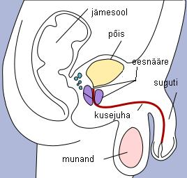 Suguti